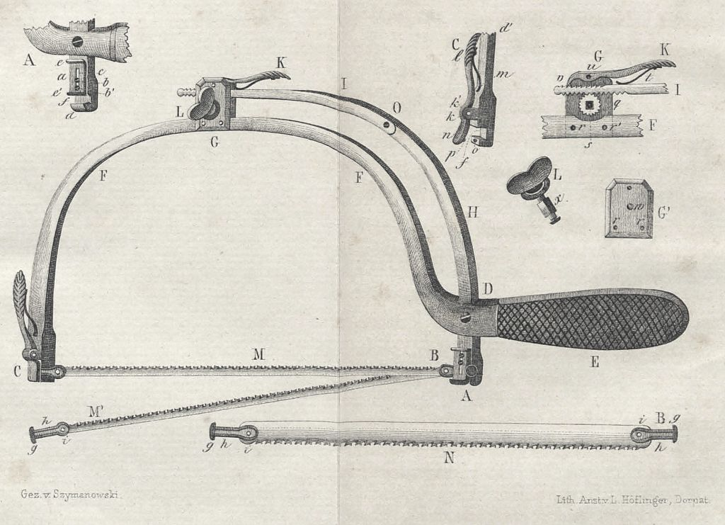 резекционная пила русского хирурга Юлия Шимановского (1829-1868)